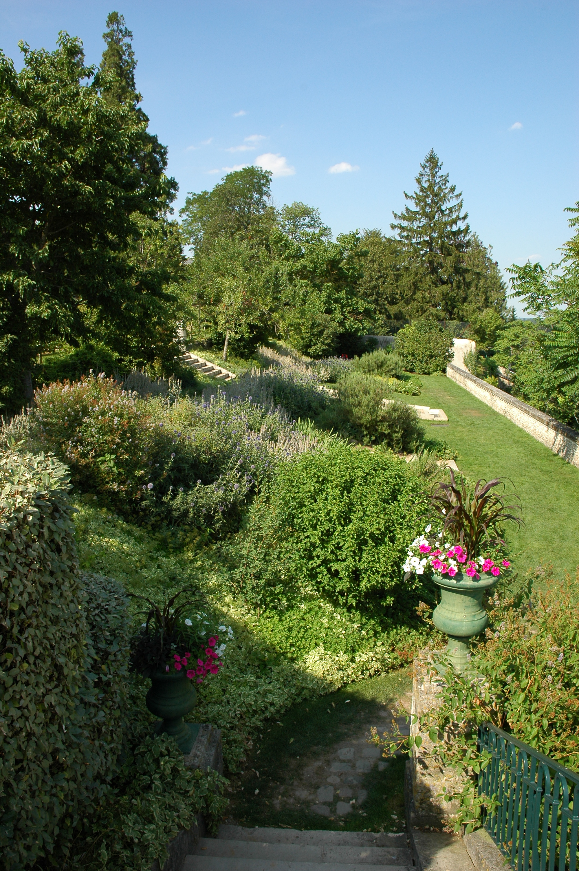 À Blois (Loir-et-Cher, France) : roseraie des jardins de l'évêché (aujourd'hui hôtel de ville).